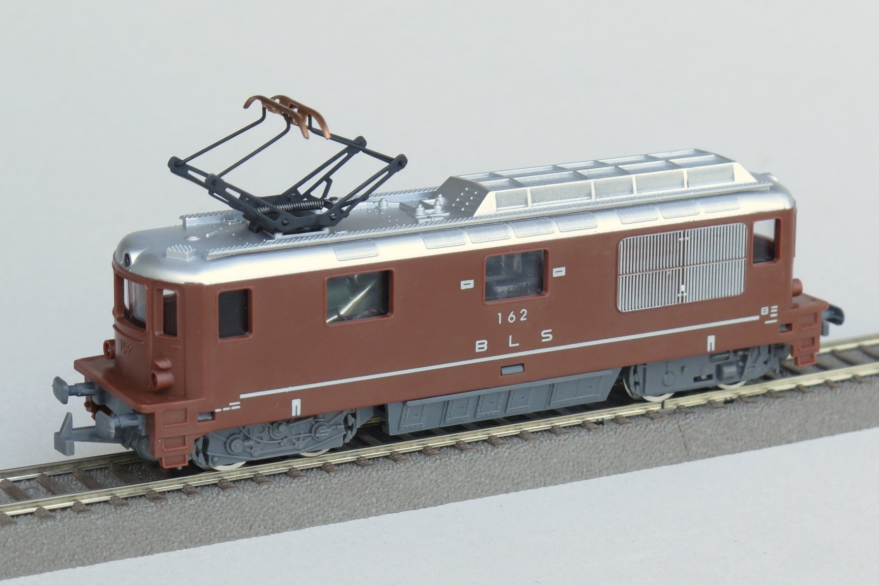 Schweizerische Elektrische Drehgestell Universallokomotive. Fahrzeugmodell in der Nenngrösse H0, im Massstab 1:87, für die Spur H0, von der französischen Firma Jouef hergestellt von 1980 bis 1981 im Irischen Shannon unter dem Markenname Jouef HDI, wobei HDI für Hobby Developments Ireland steht. Stark vereinfachte Nachbildung der BLS Re 4/4 162 der Berner Alpenbahn Gesellschaft Bern-Lötschberg-Simplon (BLS) die von der Schweizerische Lokomotiv- und Maschinenfabrik (SLM) in Winterthur und Brown, Boveri & Cie (BBC) in Baden hergestellt wurde.